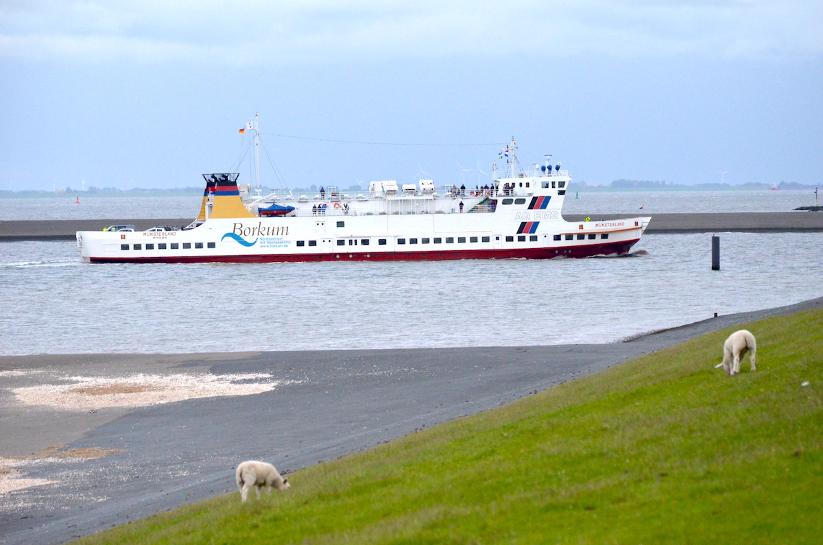 Veerboot 'Münsterland uit Borkum loopt de haven van Eemsmond binnen. Foto: Erik Swierstra.